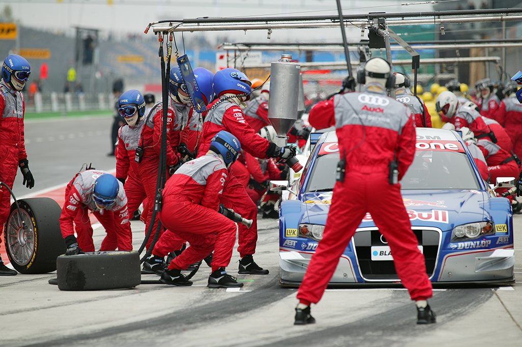 Boxengasse von Audi, Mattias Ekström, Lausitzring 2006